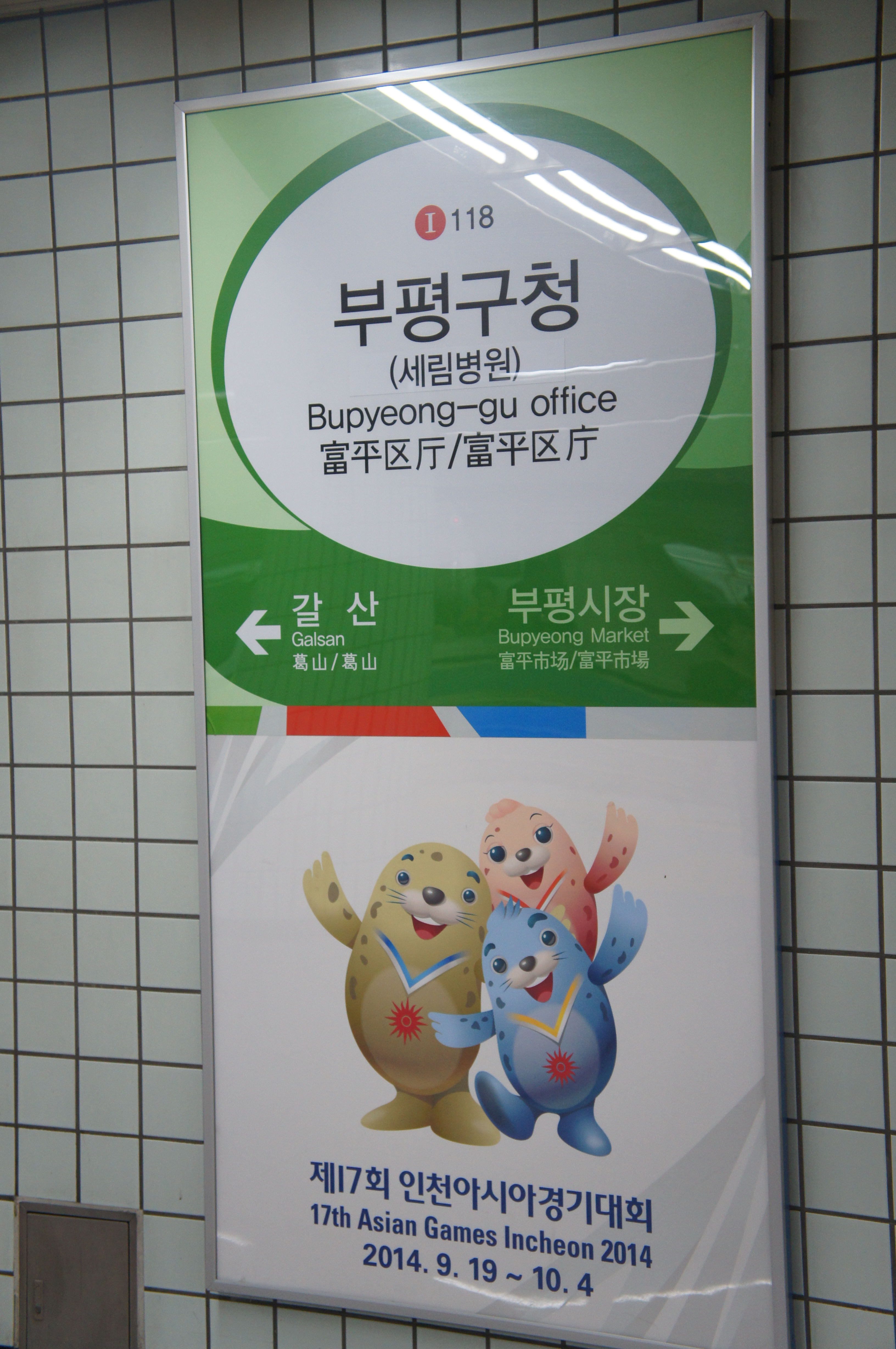 인천1호선 부평구청역 역명판